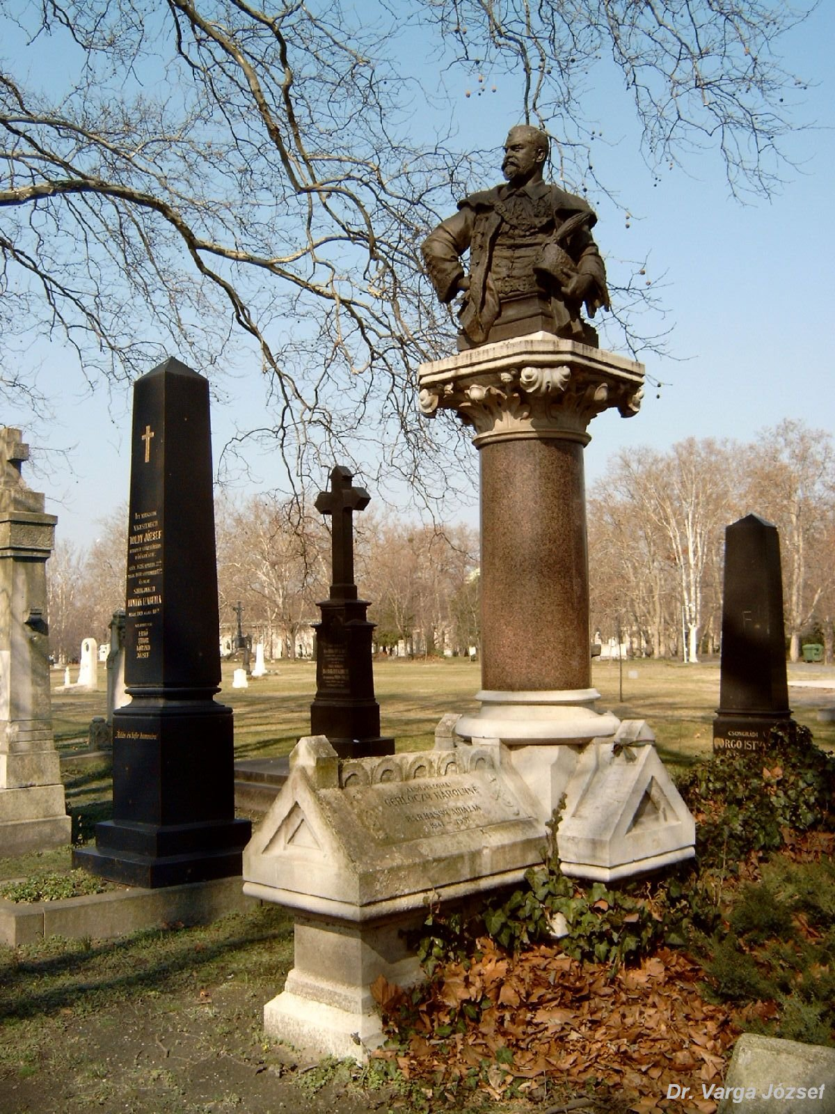 Gerlóczy Károly (Pest, 1835, május 18. – Budapest, 1900. augusztus 25.) Budapest első alpolgármestere (1873–97). Gerlóczy Gyula bátyja, Gerlóczy Zsigmond apjának sírja Budapesten. Kerepesi temető: 28-díszsor-35 [szobrász: Szécsi Antal].